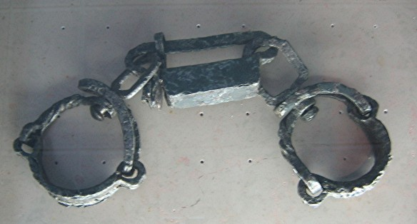 Fußfessel für Sklaven, Musée de la civilisation celtique, Bibracte, Frankreich.